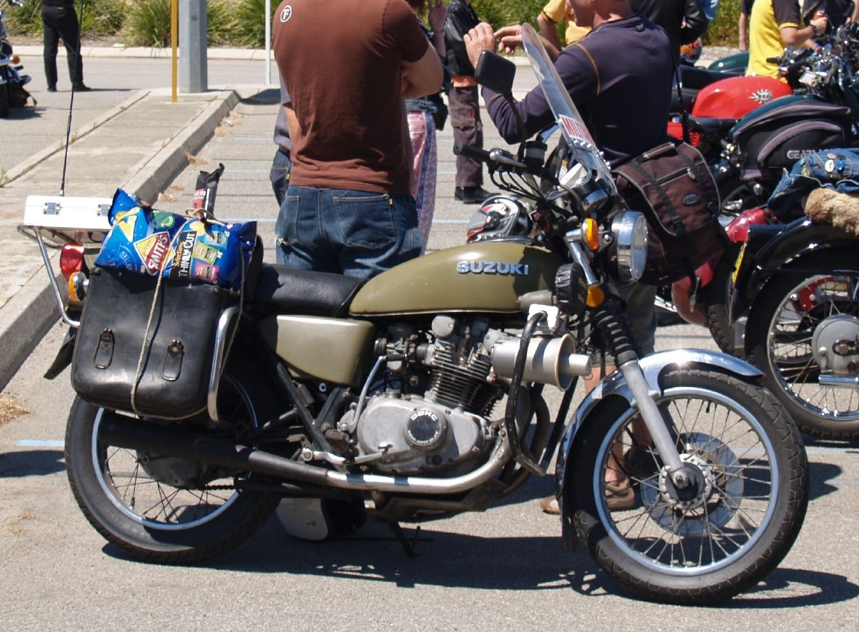 Suzuki GS400 or GS425?